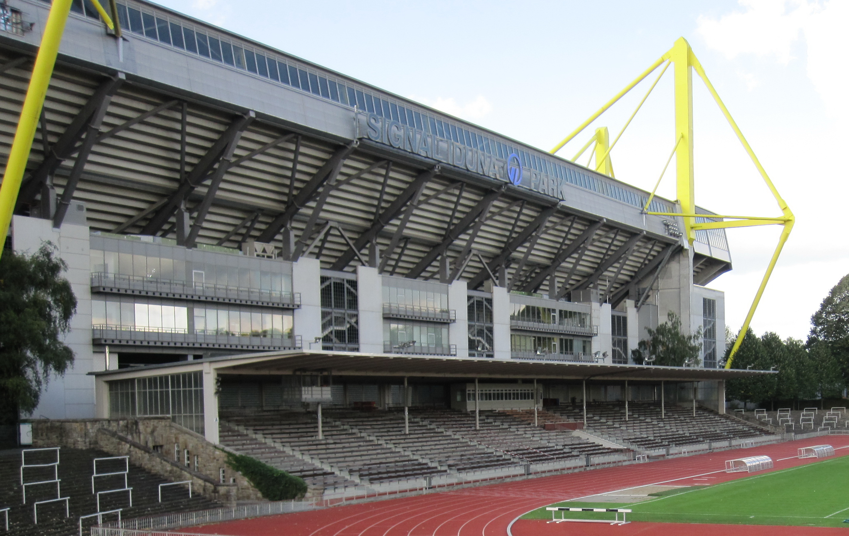 Tribüne des Stadions "Rote Erde" in Dortmund. Im Größenvergleich mit der Tribüne des Westfalenstadions.